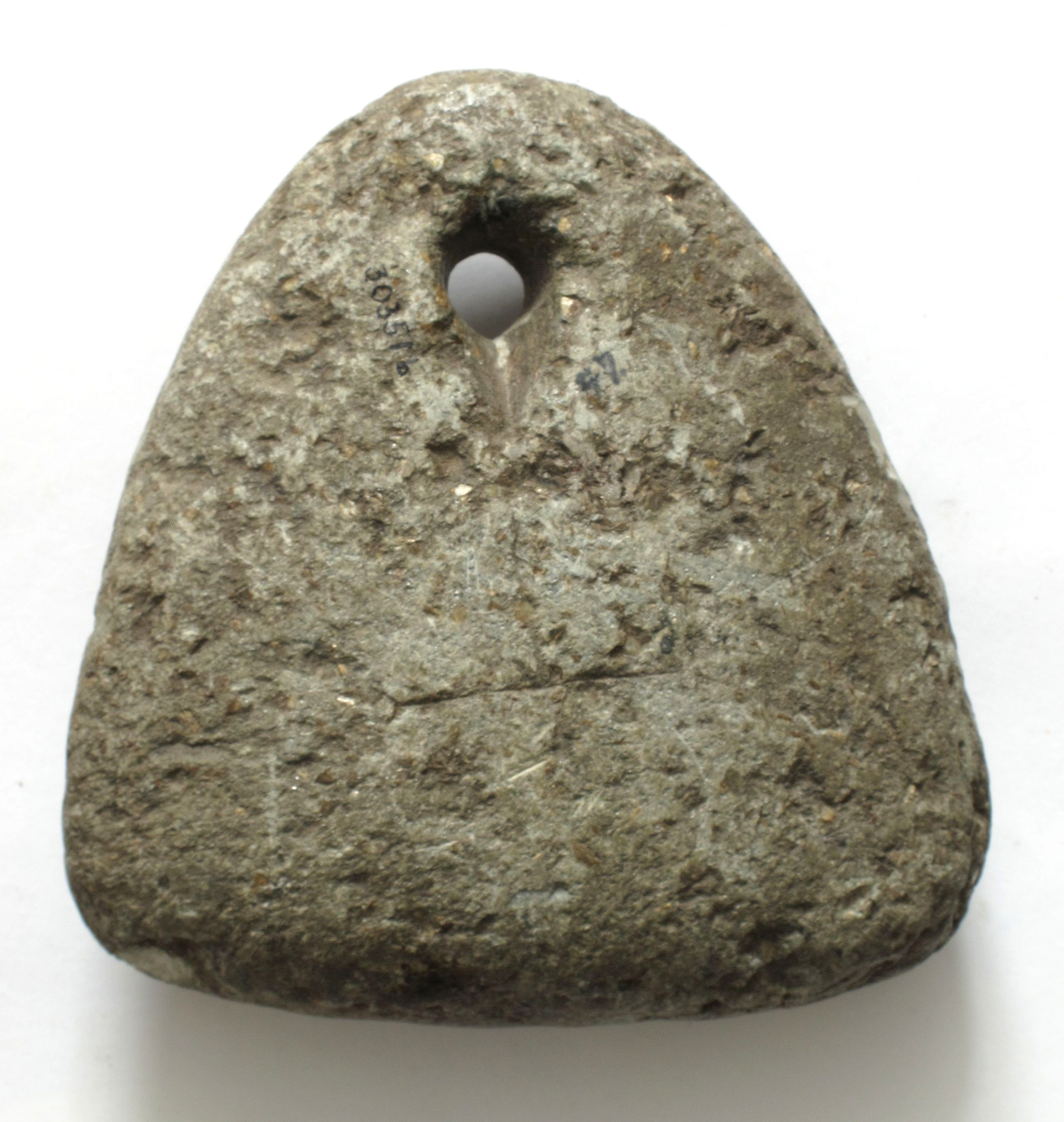 Kljåstein til oppstadvev